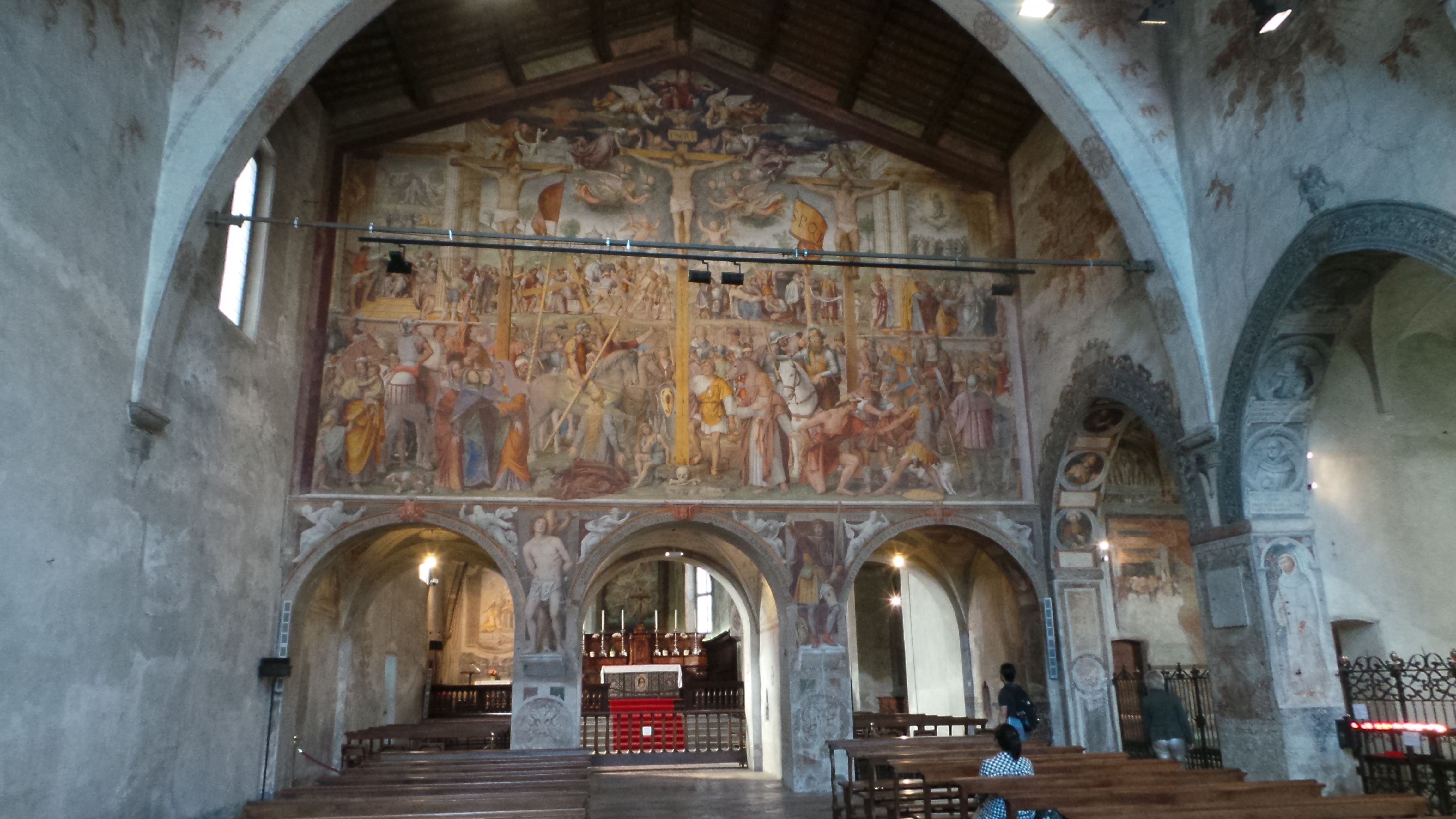 Ex Asilo Ciani